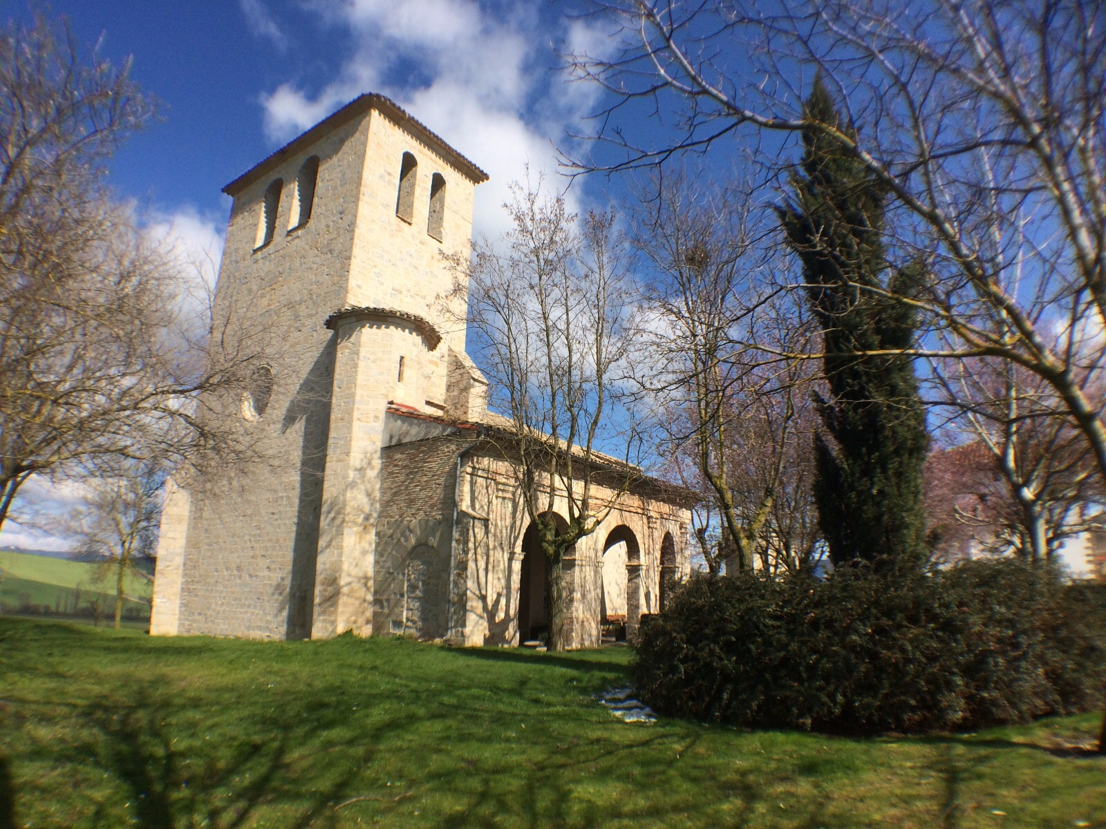 Imagen de la Iglesia de Tajonar, Taxoare, Navarra.